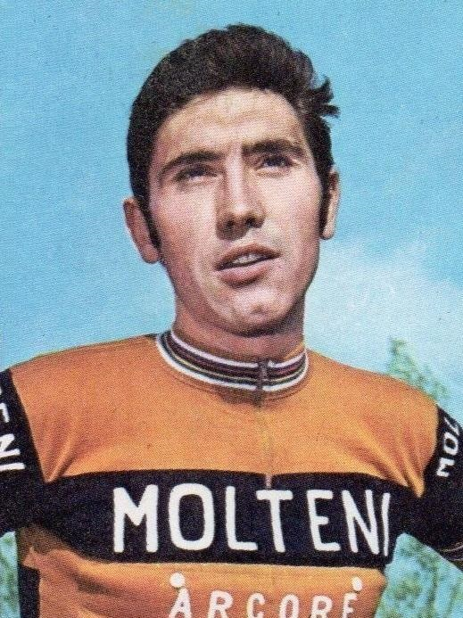 Eddy Merckx en 1971, 'Sprint 71', Panini figurina n°1.